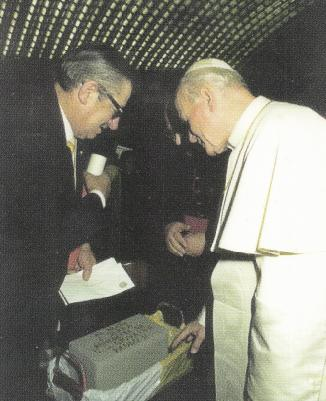 Jorio Borchi insieme a Giovanni Paolo II in occasione della visita del Santo Padre a Prato.